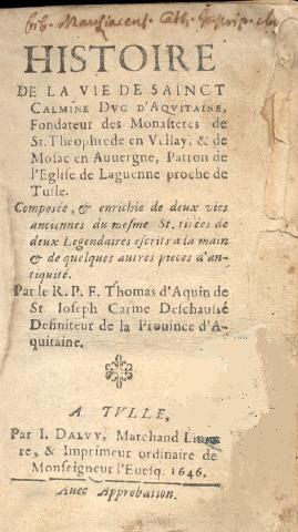 Incipit du livre Histoire de la vie de sainct Calmine [...] (1646) par le Révérend Père Frère Thomas d'Aquin de Saint-Joseph Carme Déchaussé, définiteur de la province d'Aquitaine. Livre conservé à la BNF sous la cote 8-LN27-3404.